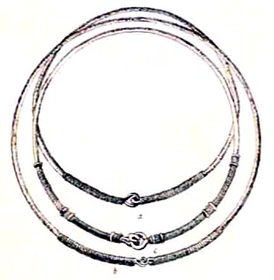 O descoperire făcută în 1865 la Osztropataka, în comitatul Saros din Ungaria, conținea o ușoară armilla („brățară” în limba latină) ușoară și simplă de aur, decorată în același fel, dar pe o lungime mai mare decât cea de la Pietroasa fig. 1a). Acesta este și cazul a celor două cercuri de aur, dintre care unul este puțin mai mare (b), în timp ce celălalt este prevăzut suplimentar pe fiecare parte cu trei inele răsucite și rizate (c); aceste două obiecte au fost descoperite în 1846, de către un țăran, într-o carieră din Bucovina pe cursul pârâului Klokusca din apropierea orașului Cernăuți.